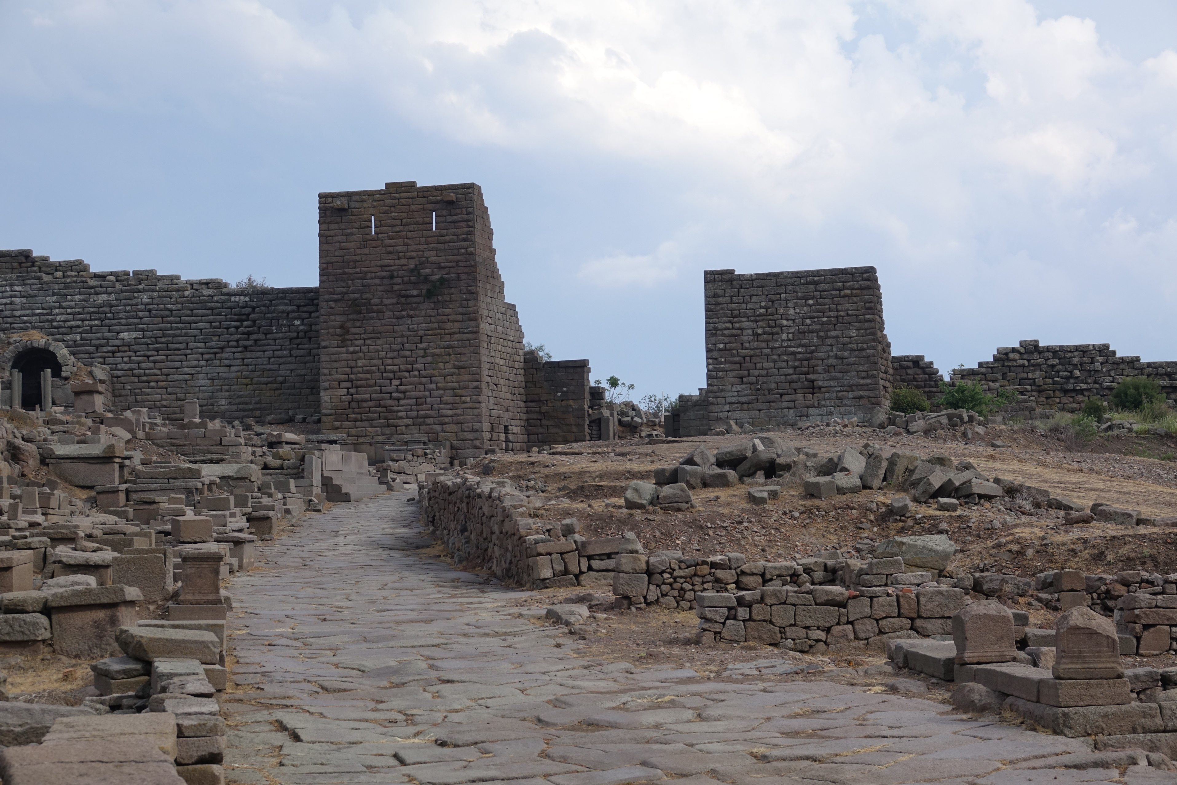 Nekropole, Stadtmauer, Wehrtürme